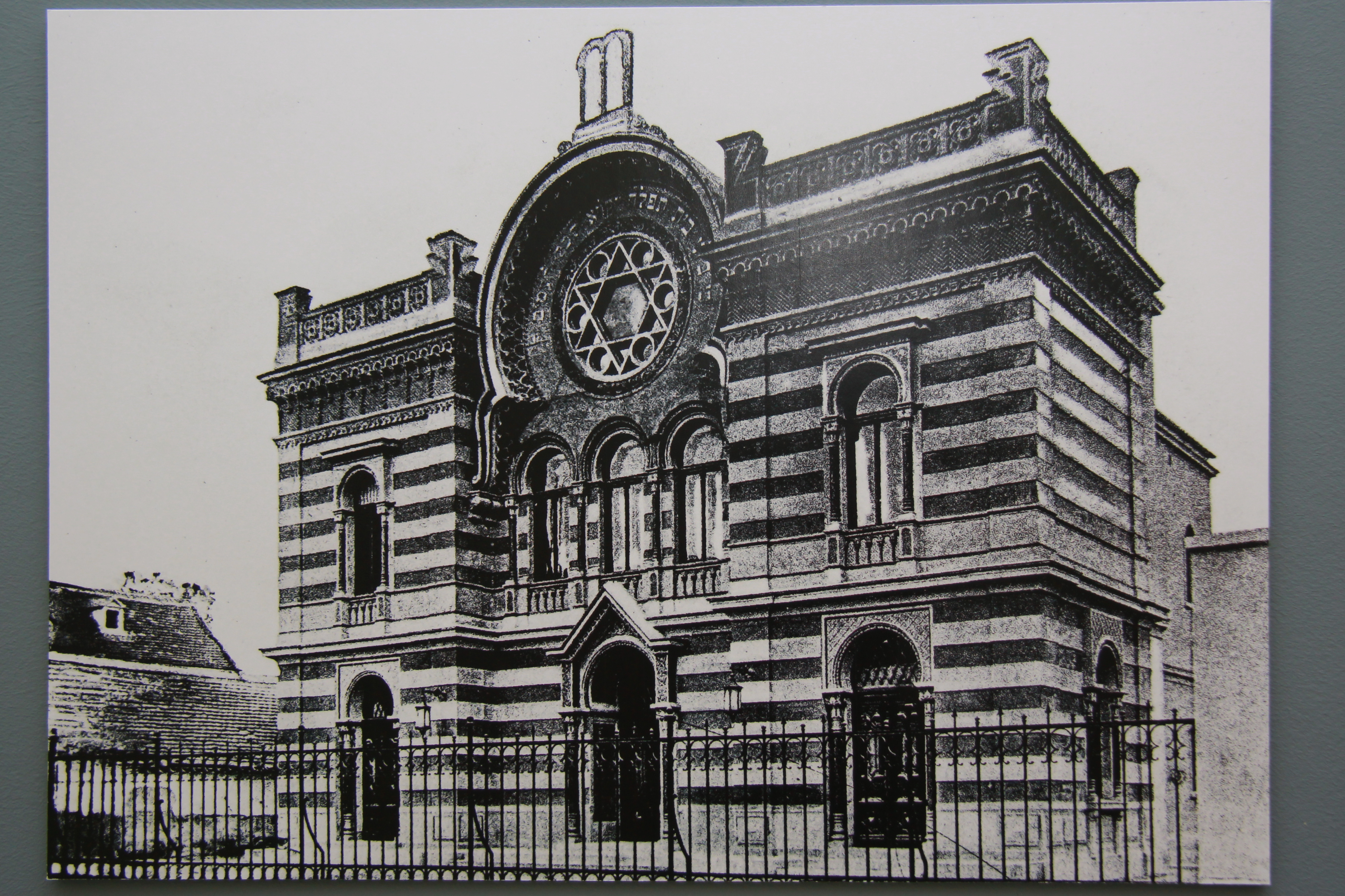 Industrieviertel-Museum in Wiener Neustadt, Niederösterreich - Synagoge Wiener Neustadt